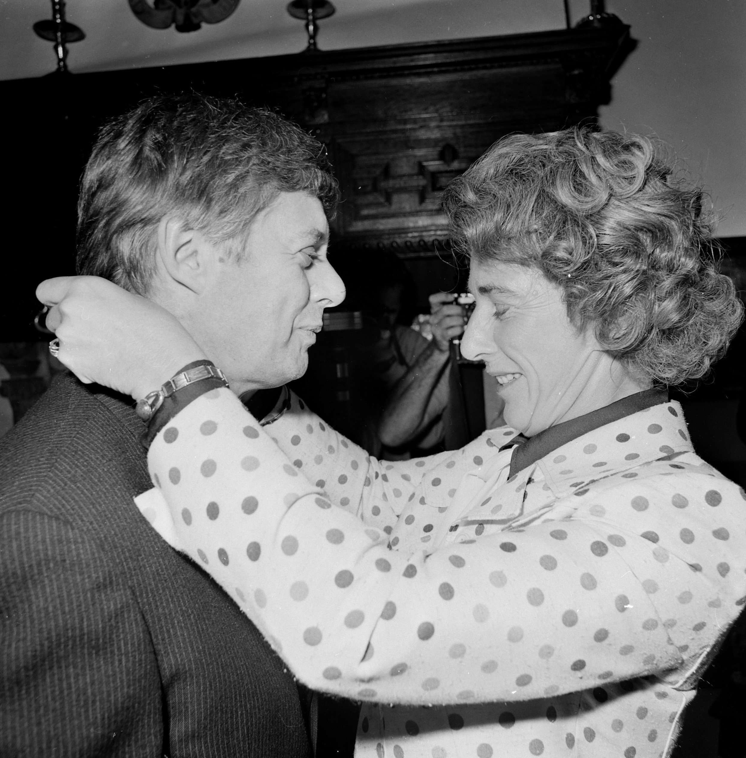 Collectie / Archief : Fotocollectie Anefo Reportage / Serie : [ onbekend ] Beschrijving : Uitreiking PC Hooftprijs 75 aan Rudy Kousbroek door minister Gardeniers op Muiderslot Datum : 18 september 1978 Trefwoorden : Uitreikingen Persoonsnaam : Gardeniers-Berendsen, Til Instellingsnaam : Muiderslot Fotograaf : Croes, Rob C. / Anefo Auteursrechthebbende : Nationaal Archief Materiaalsoort : Negatief (zwart/wit) Nummer archiefinventaris : bekijk toegang 2.24.01.03 Bestanddeelnummer : 929-9067